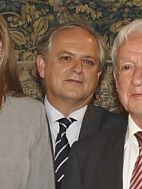 María Dolores Cospedal, presidenta de Castilla-La Mancha, recibe al Pleno del Tribunal Constitucional